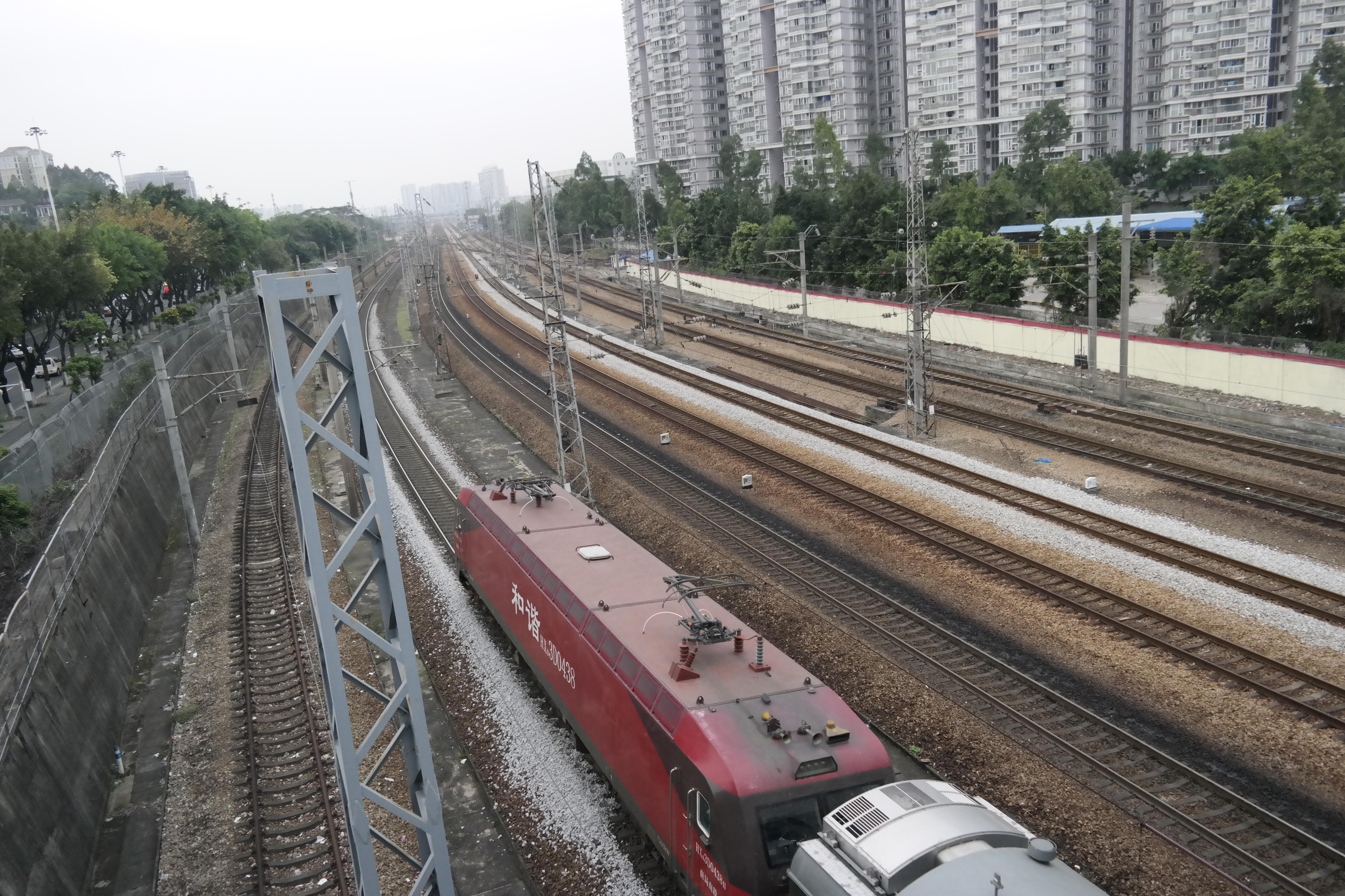 中文（中国大陆）: 广园快速路人行天桥上拍车